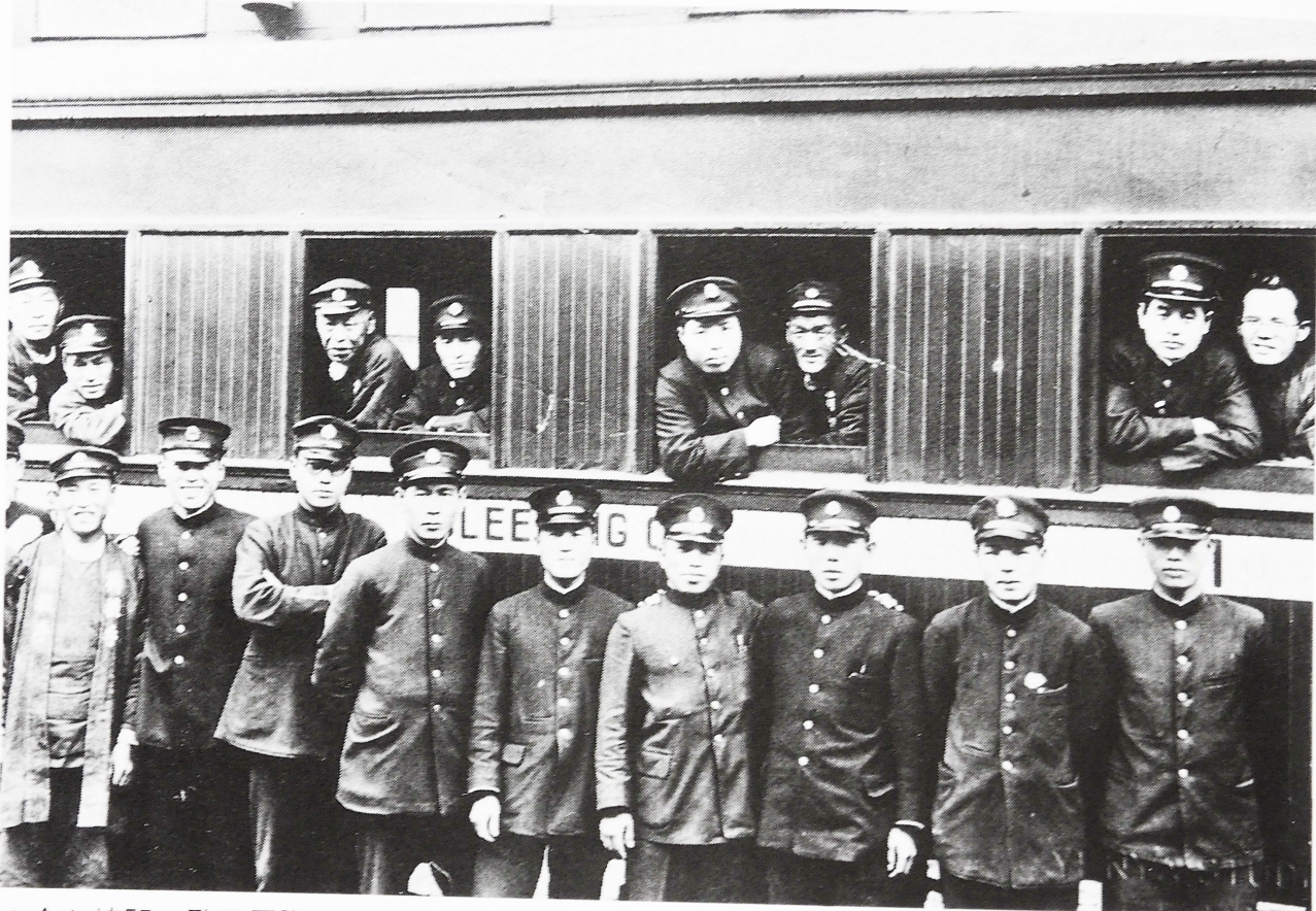 金ケ崎駅の欧亜国際連絡列車。福井県敦賀市。